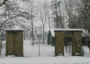 De homeiepeallen fan Grut Terherne, no (2007) de tagong ta de sportfjilden fan Bitgum en Bitgummole